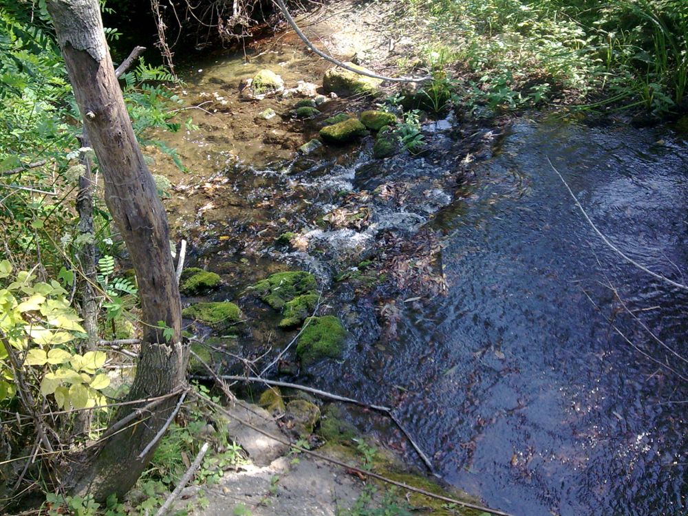 Река Раља.